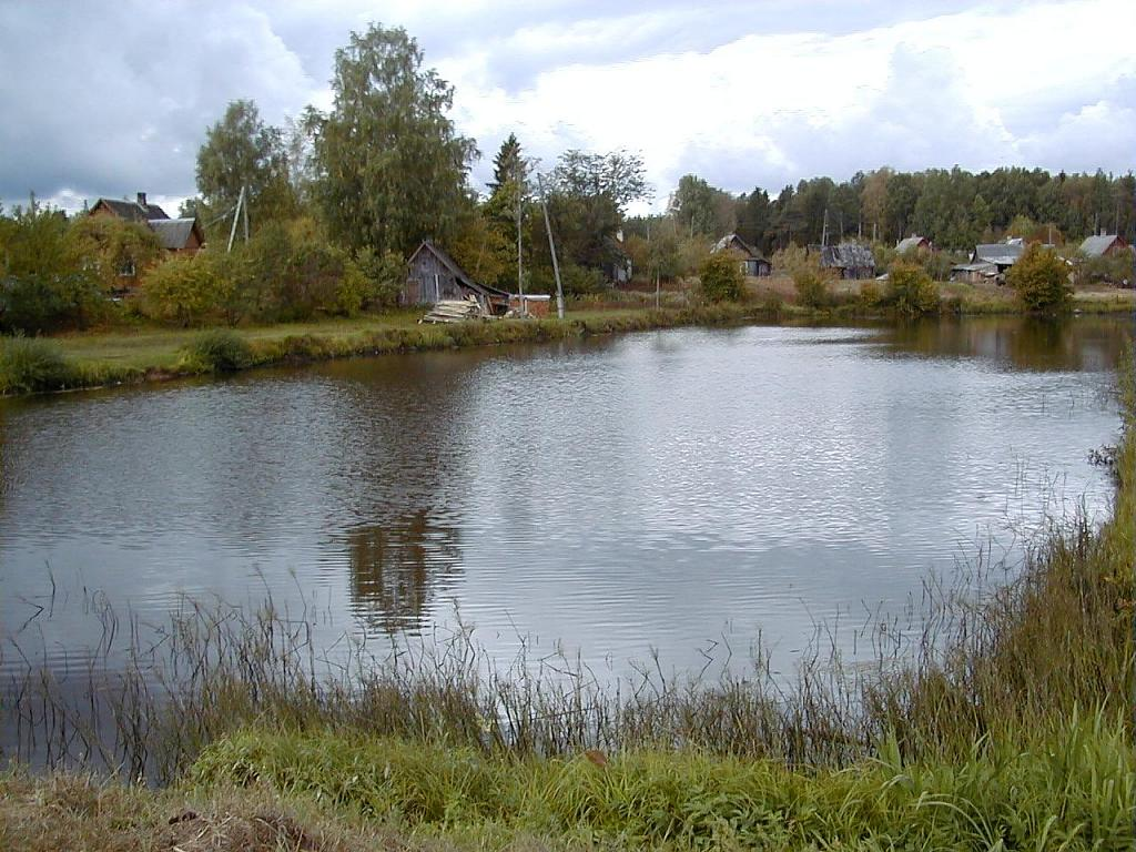 Viricas upes dīķis Žīguros 2002-09-14